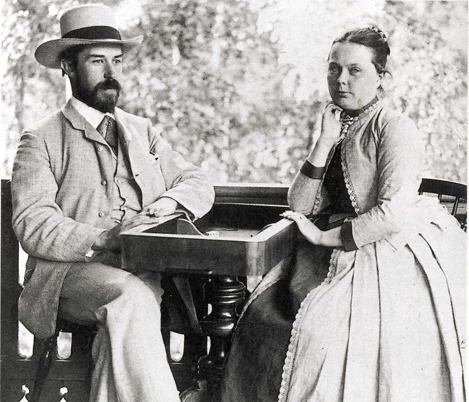 Tähtitieteen professori Anders Donner (1854–1938) ja hänen vaimonsa Elin Donner Otto Donnerin huvilalla Bromarvissa vuonna 1889.